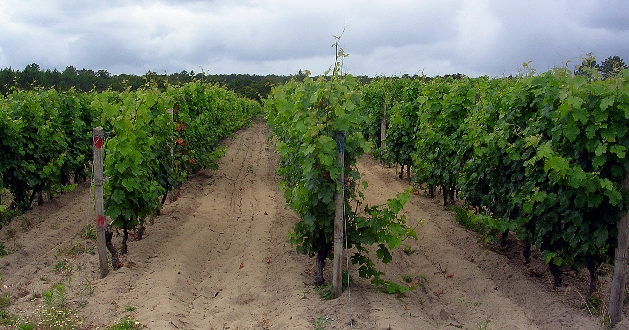 Domaine de la Pointe, à Capbreton (Landes, France)